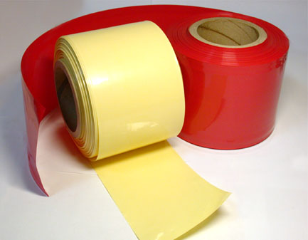 Полиамидная оболочка Биолон